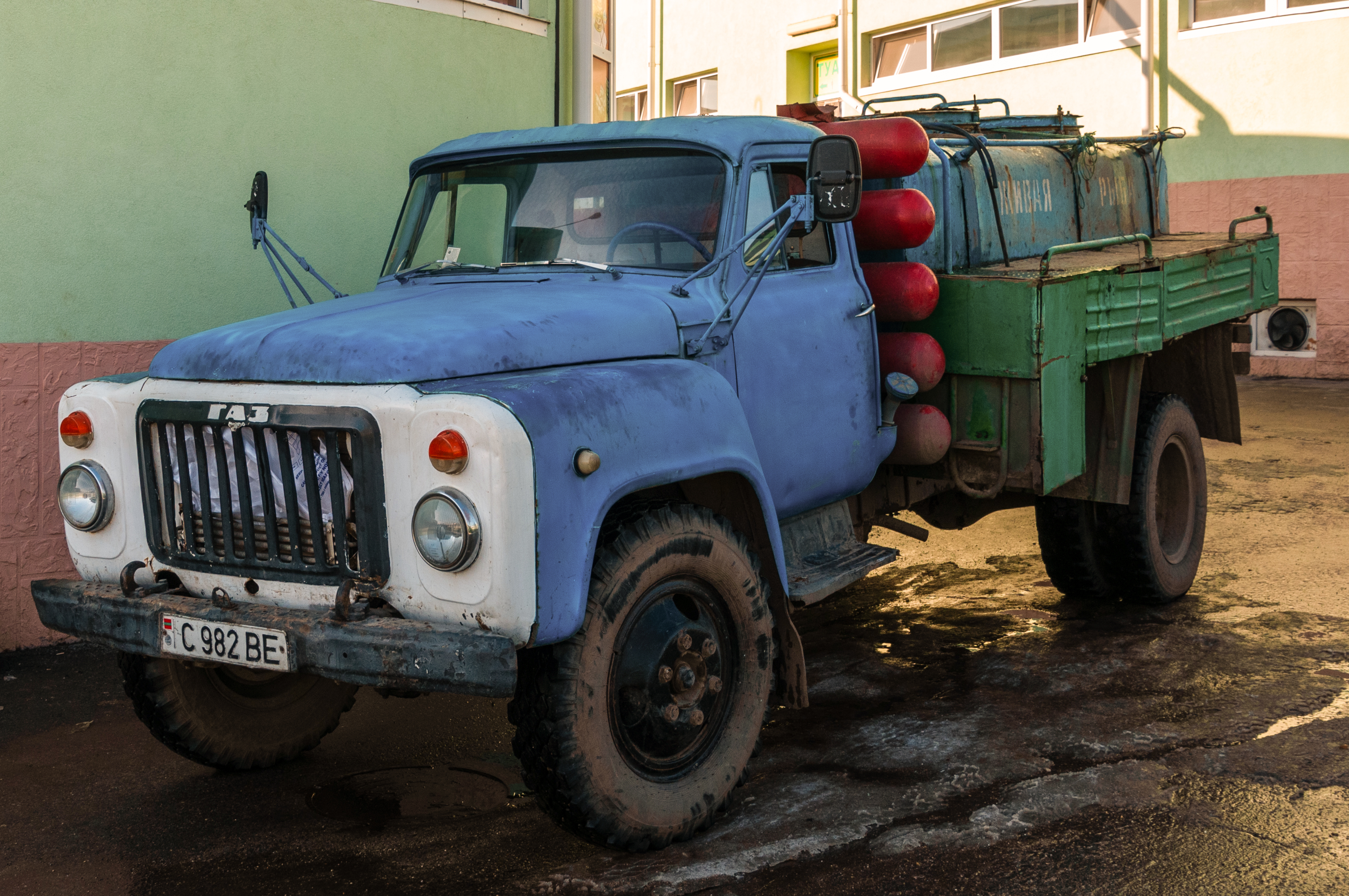 Tiraspol, Pridnestrowien, LKW GAS-53-27 mit Erdgasantrieb (rote Tanks) als Transporter für lebenden Fisch